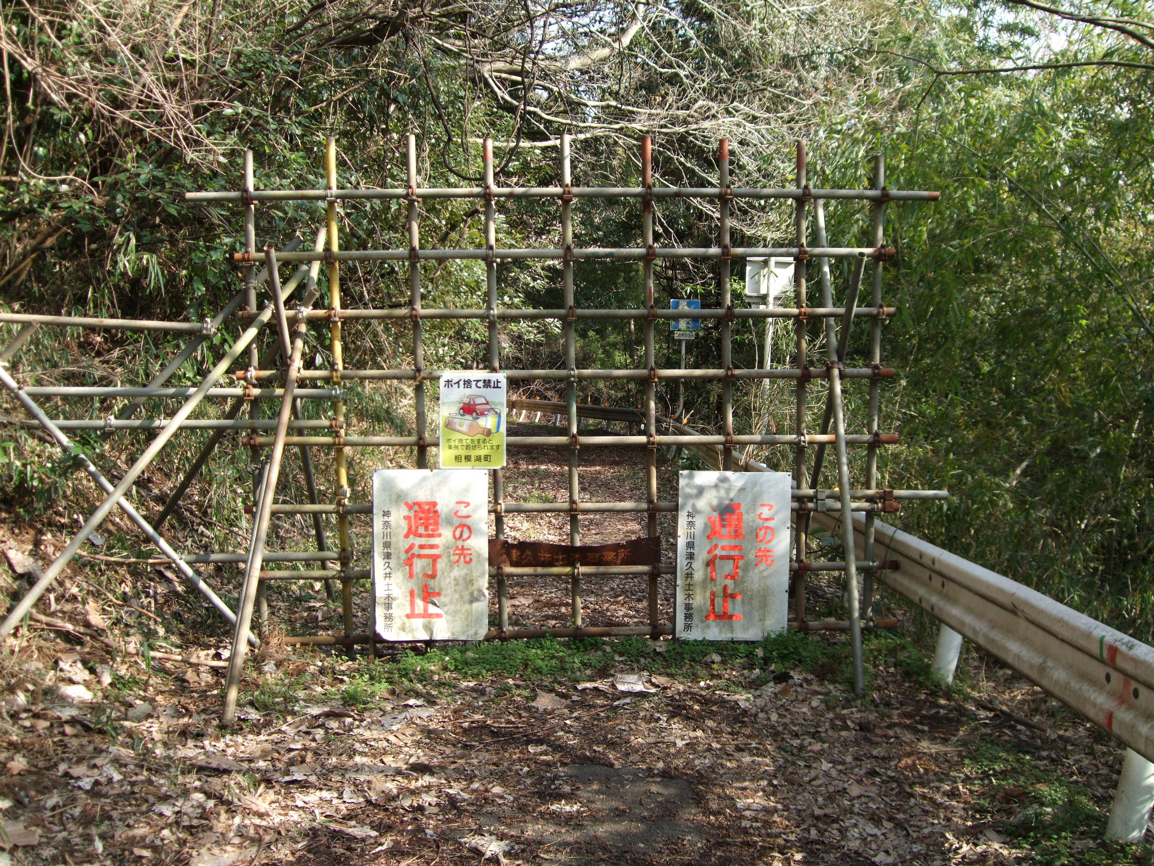 r515 Kanagawa Chigira2